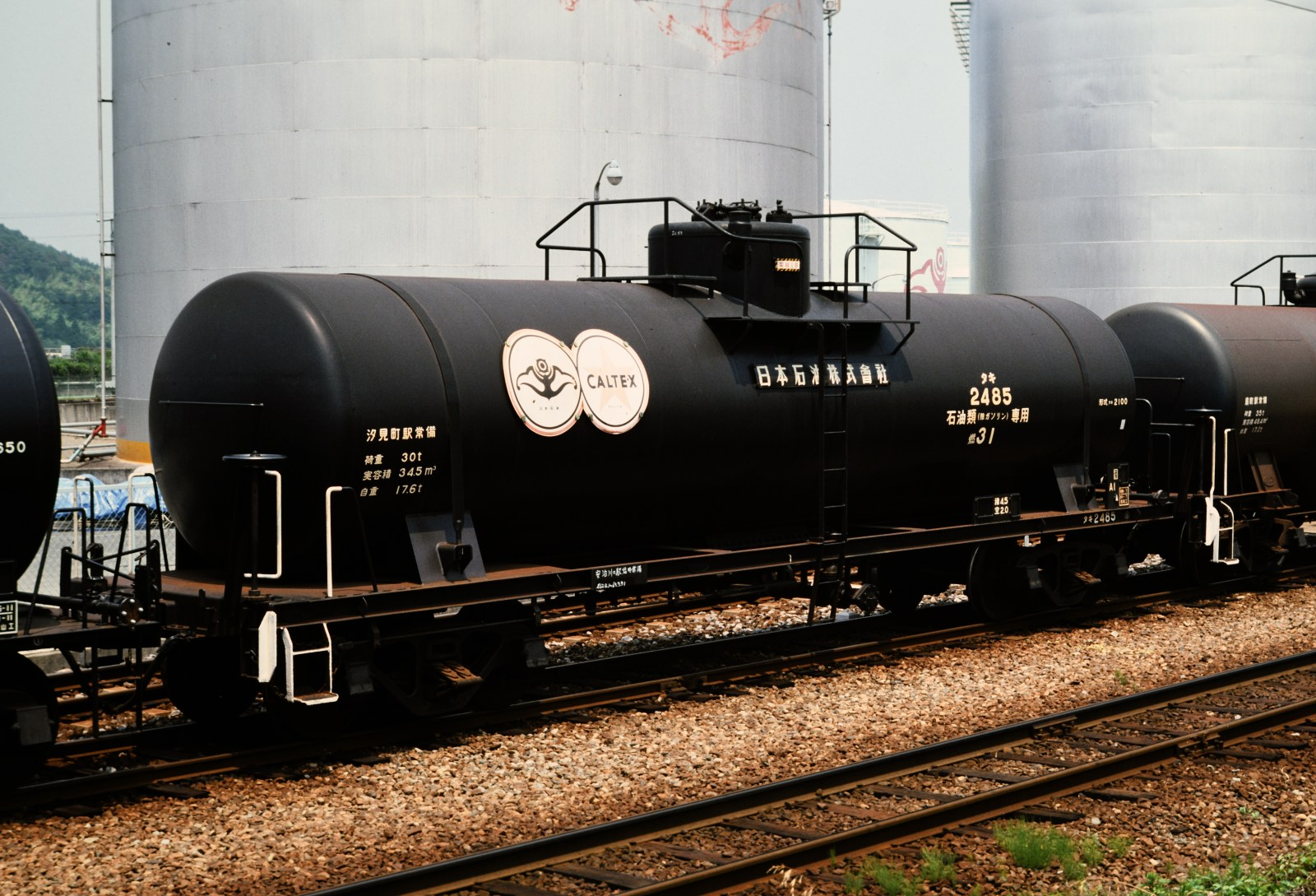 私有貨車タキ2100形タキ2485。日本石油所有。近江鉄道・鳥居本駅にて。